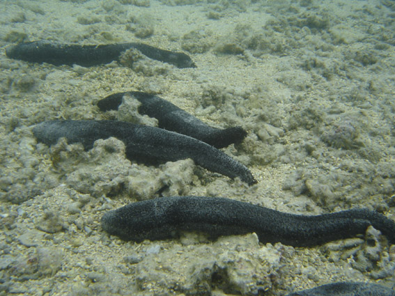 Holothuria leucospilota (Ile de la Réunion) (Photo personnelle)